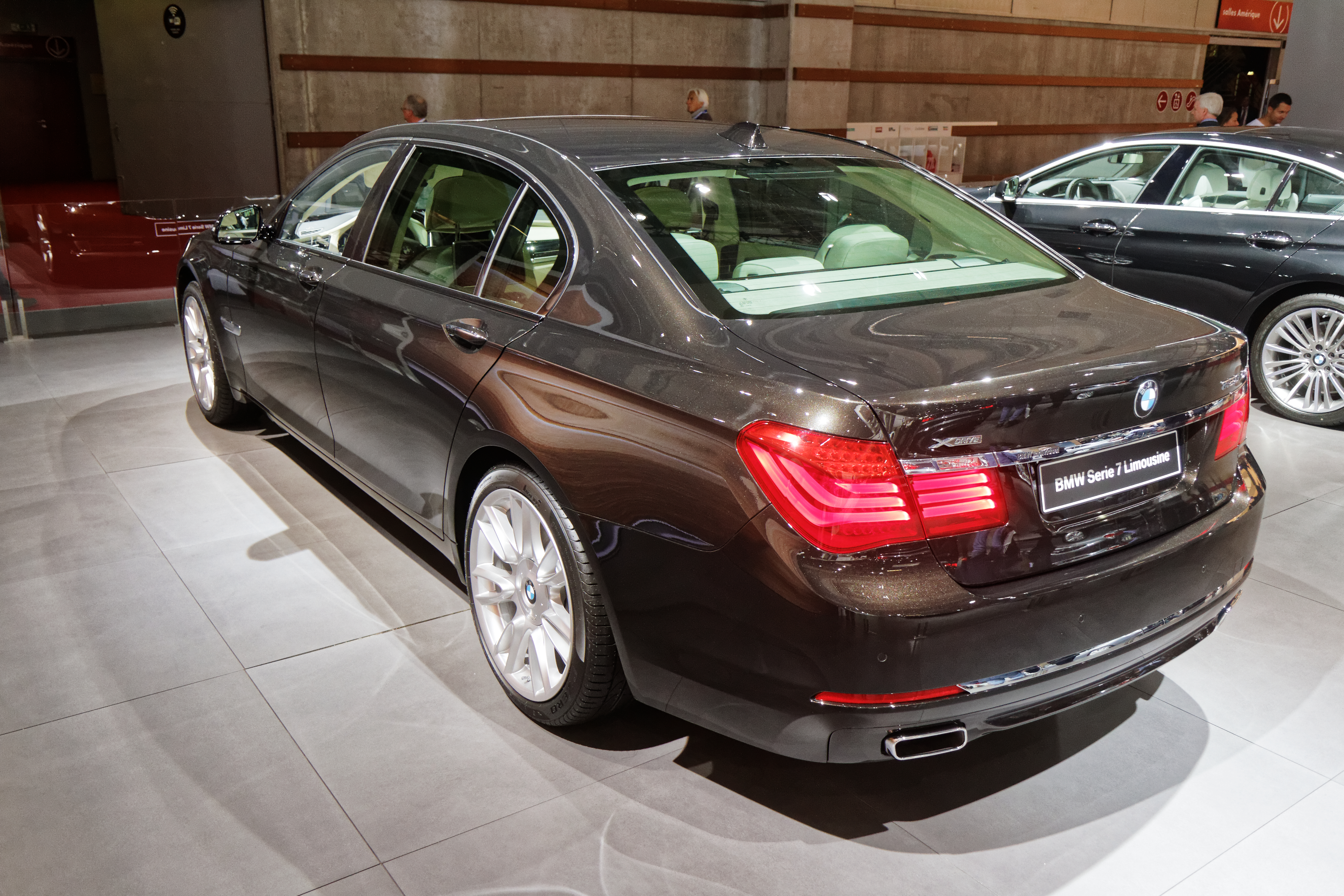 Une BMW Serie 7 Limousine présentée lors du mondial de l'automobile de Paris 2014.